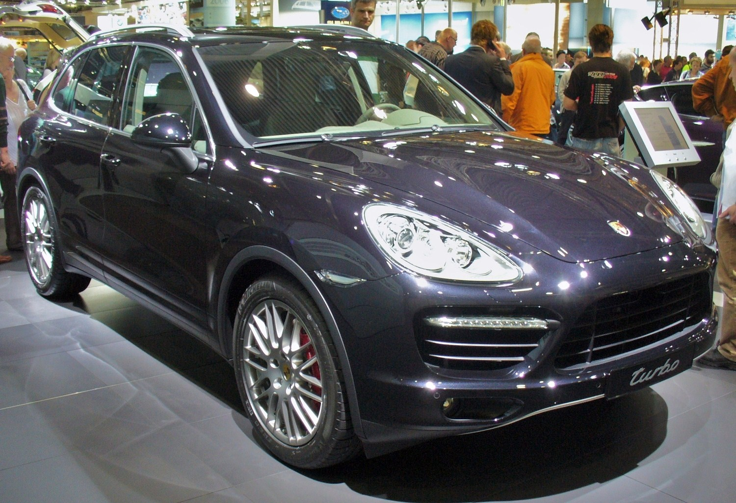 Porsche Cayenne II